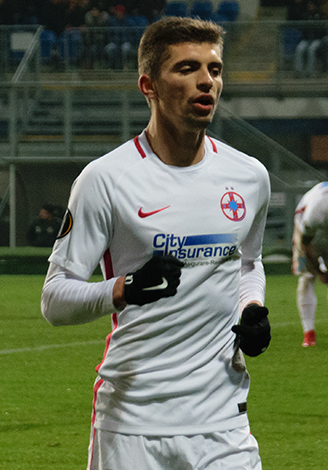 Florin Tănase